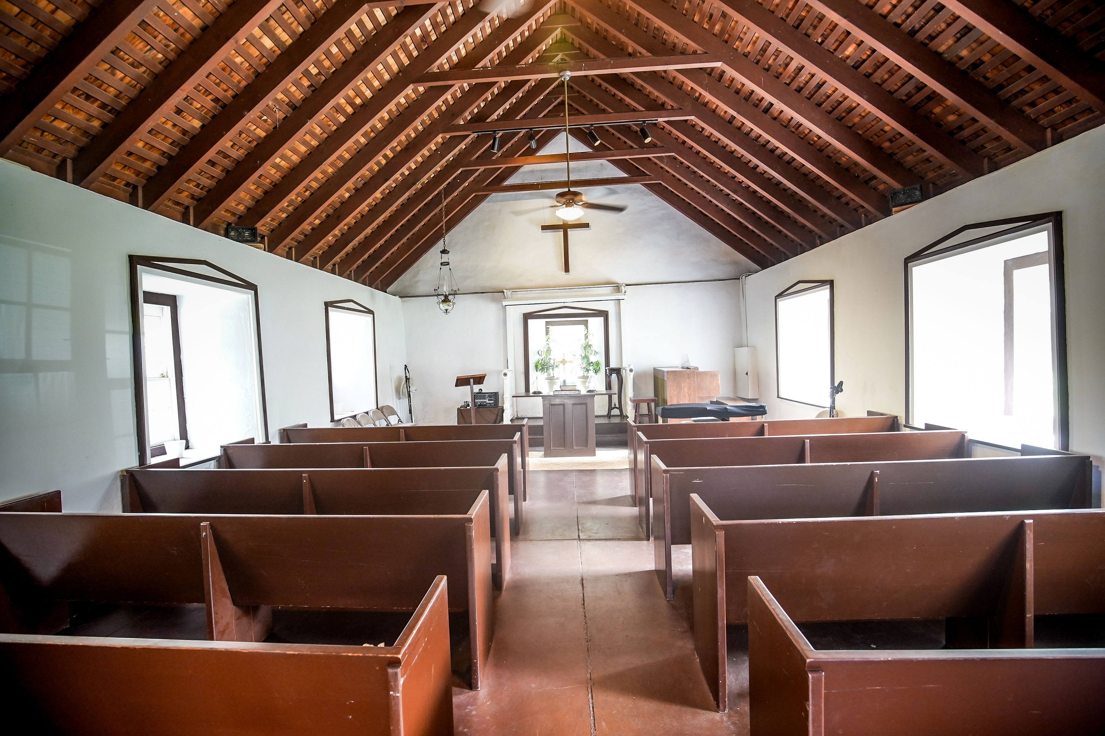 Hokuloa Church, Puako, Island of Hawaii - Inside View